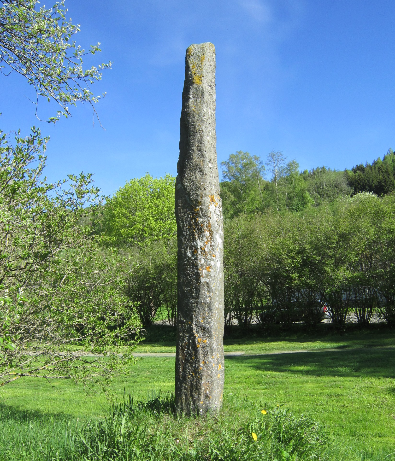 Runestein nord for Fåberg kirke